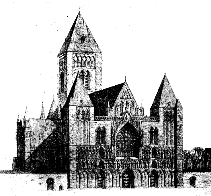 Nidaros Cathedral